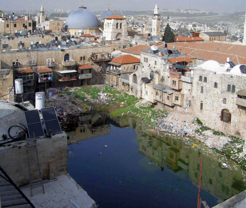 בריכת חזקיהו